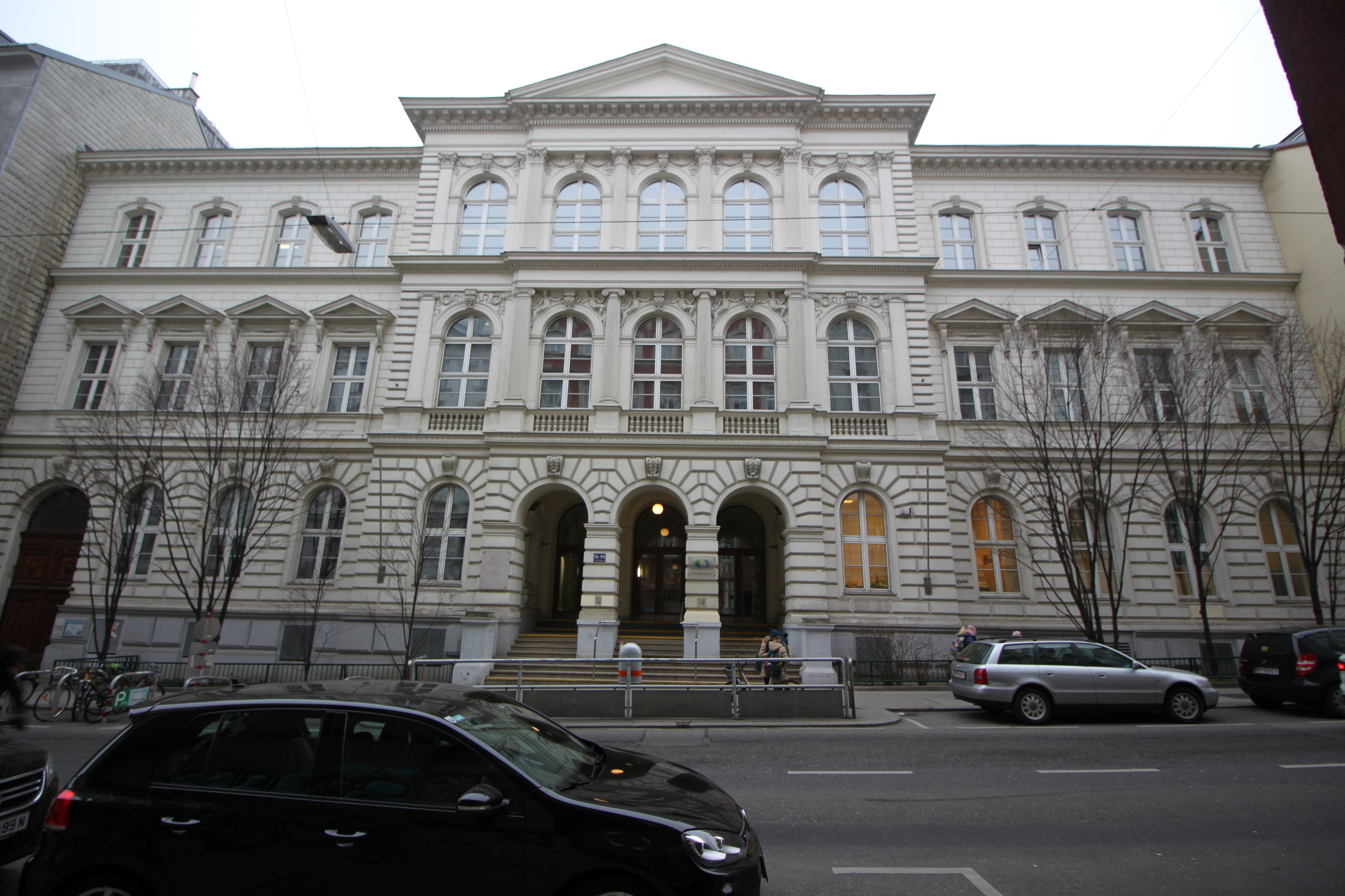 Schottenfelder Realschule, dann Musikgymnasium Wien, Hauptfront zur Neustiftgasse, Nr. 95-99